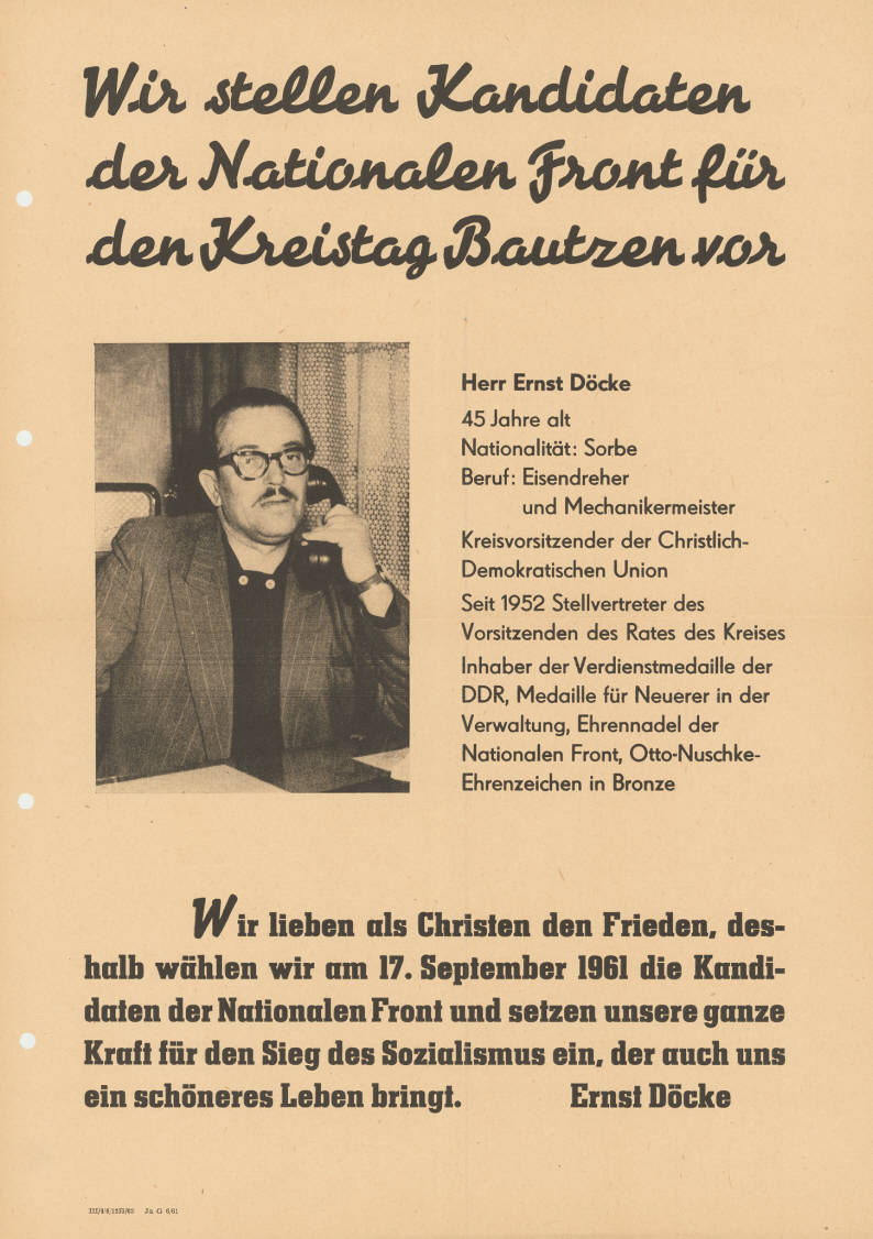 Wir stellen Kandidaten der Nationalen Front für den Kreistag Bautzen vor Herr Ernst Döcke 45 Jahre alt Nationalität: Sorbe ... Kreisvorsitzender der CDU ... Wir lieben als Christen den Frieden, deshalb wählen wir am 17. September 1961 die Kandidaten der Nationalen Front und setzen unsere ganze Kraft für den Sieg des Sozialismus ein, der auch uns ein schöneres Leben bringt. Ernst Döcke Abbildung: Porträtfoto, am Telefonhörer Plakatart: Kandidaten-/Personenplakat mit Porträt Drucker_Druckart_Druckort: III/4/6/1255/03 Ja G 6/61 Objekt-Signatur: 10-024 : 3203 Bestand: Plakate aus der SBZ/DDR (10-024) GliederungBestand10-18: Ost-CDU / CDUD / Exil-CDU Lizenz: KAS/ACDP 10-024 : 3203 CC-BY-SA 3.0 DE